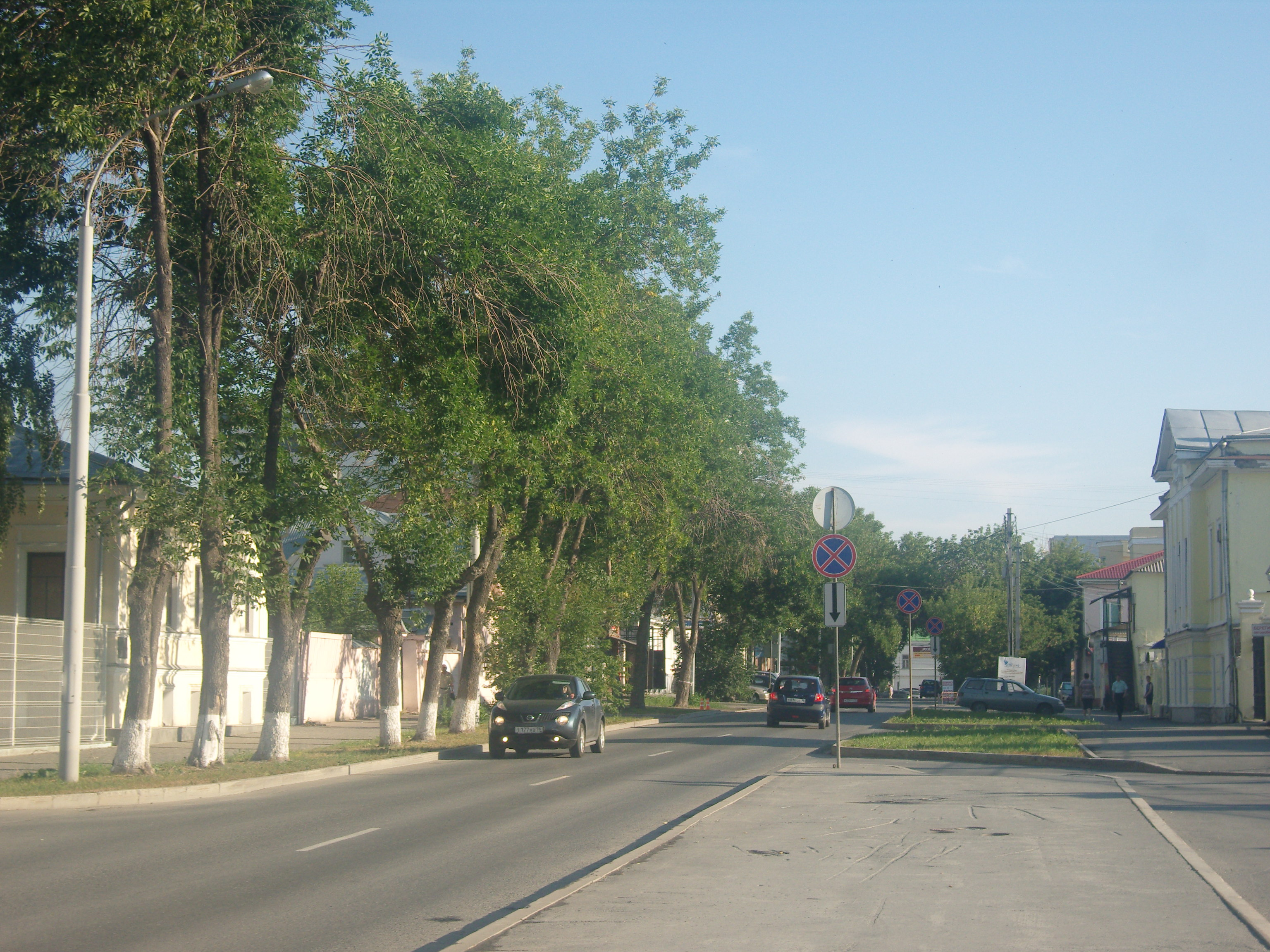 Улица Добролюбова (Екатеринбург)